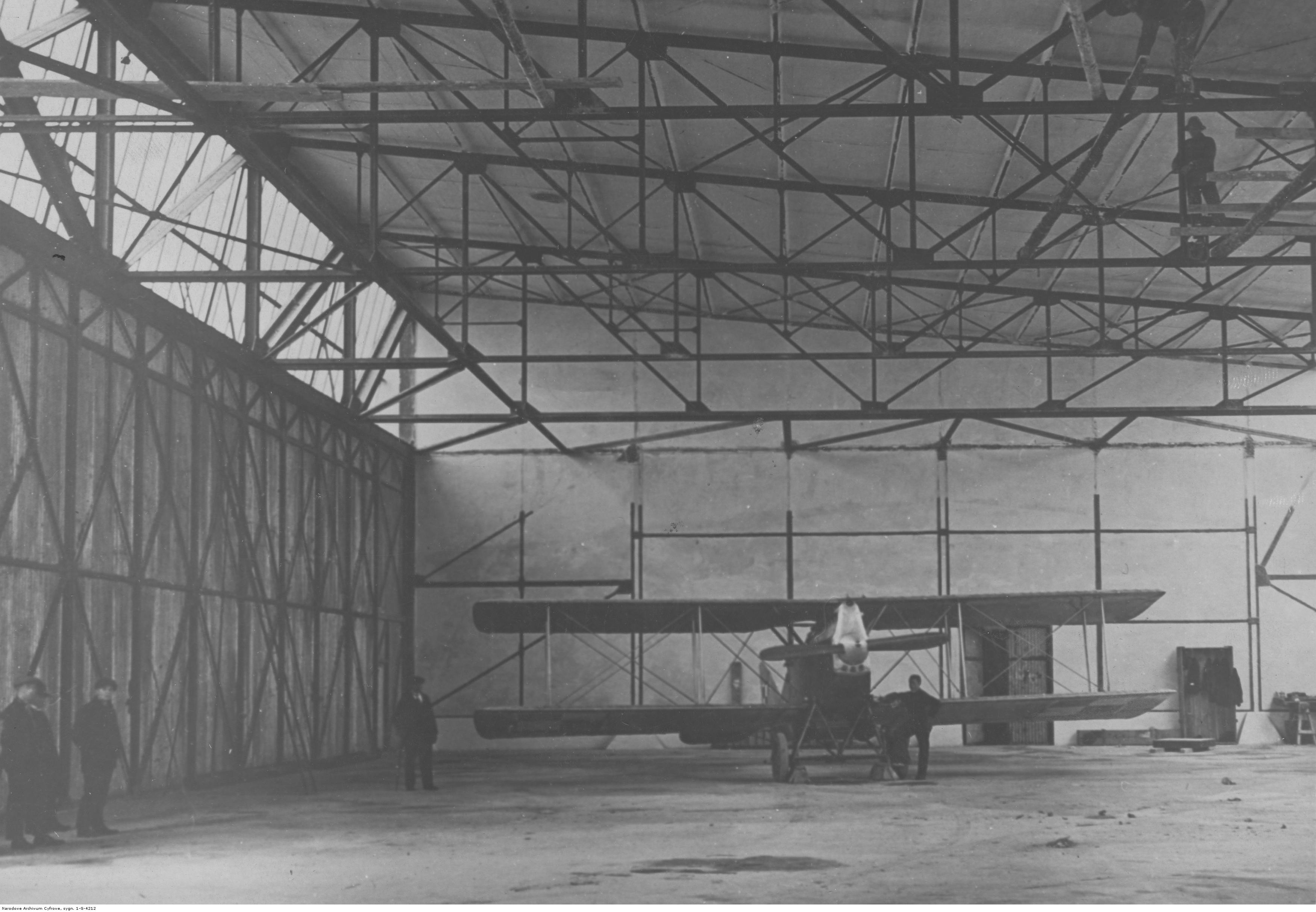 Samolot Ansaldo A-300-4 w hangarze.